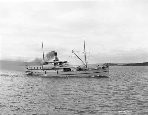 D/S Bastø (b. 1885, Akers Mekaniske Verksted, Christiania)